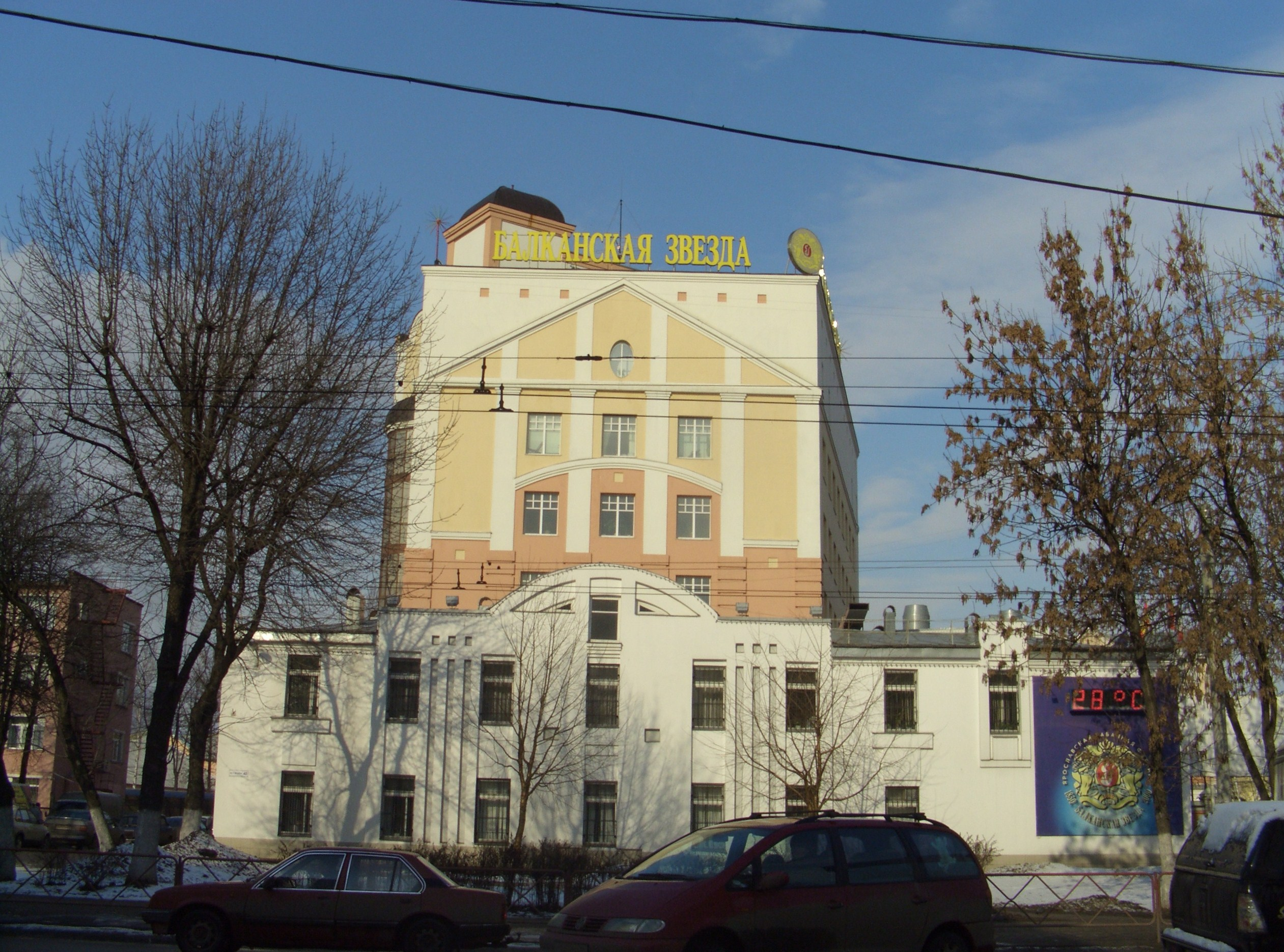 Балканская звезда